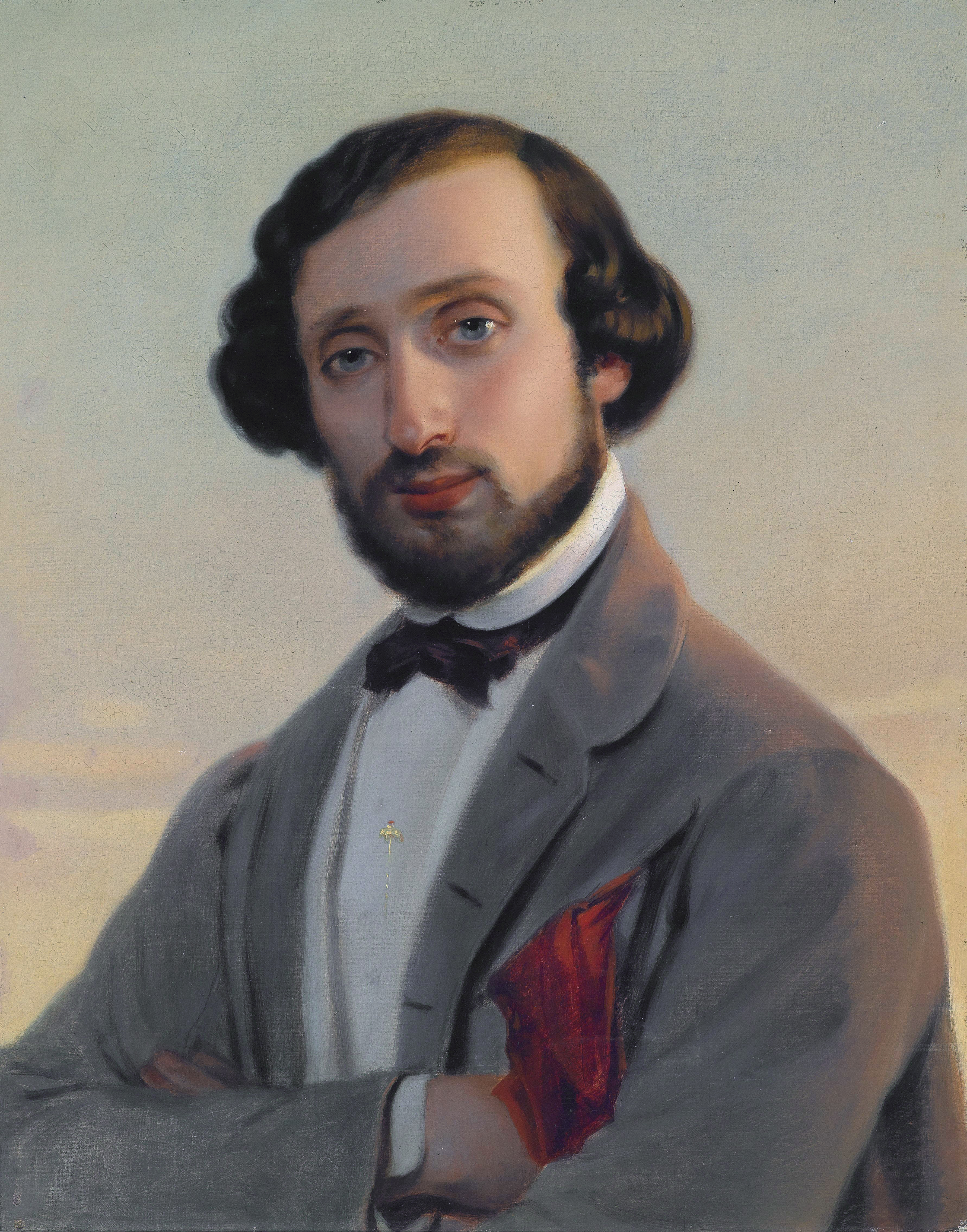 Bildnis Ludwig August Frankl von Hochwart (1810-1894)